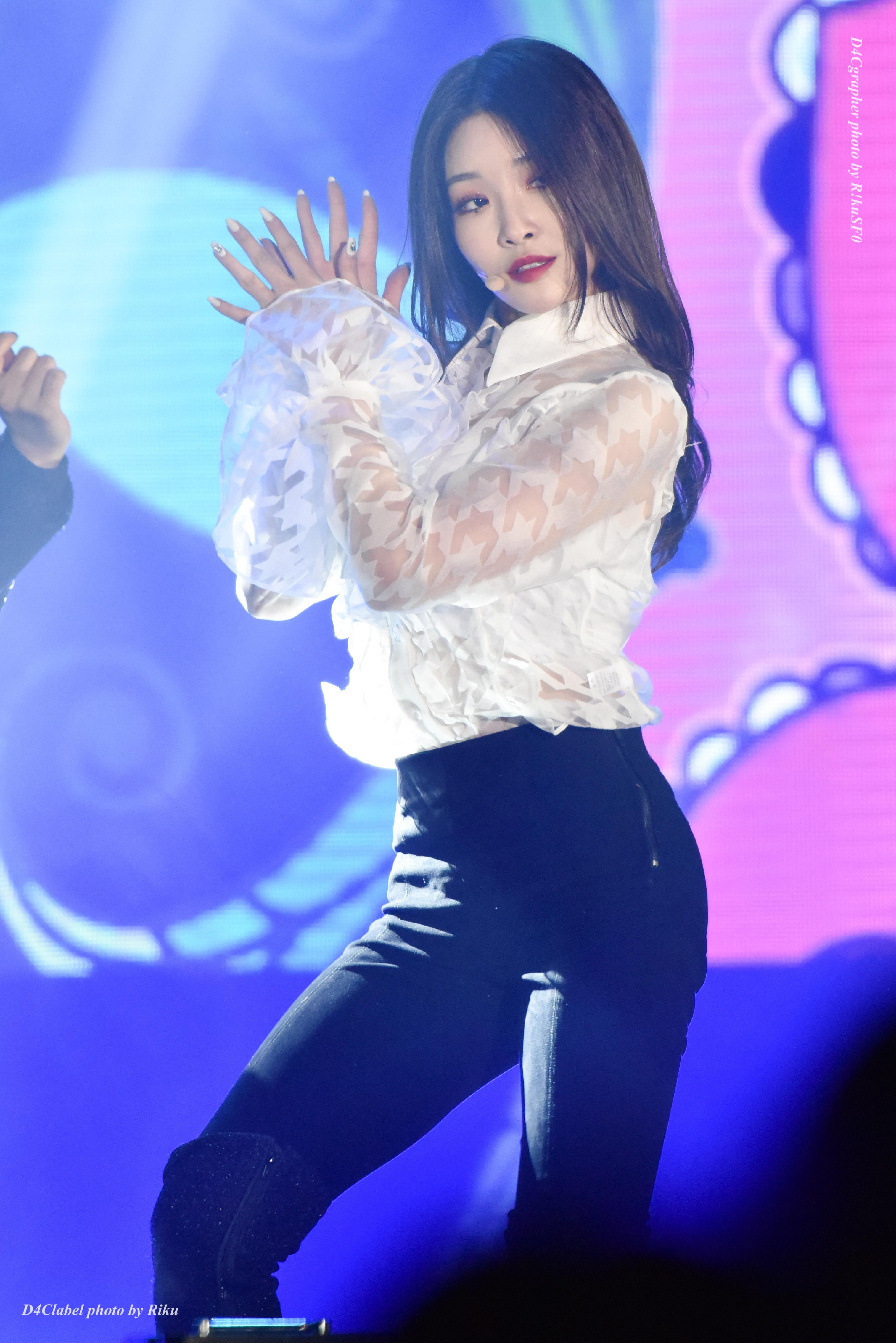 2018 평창 패럴림픽 성화 합화행사 축하공연